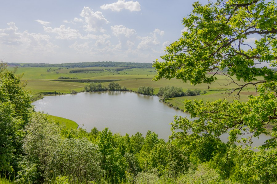 Озеро Кара-куль: Высокогорский район РТ, 0,6 км юго-восточнее д. Кара-куль,д. Кара-куль,Высокогорский район, Татарстан This image is related to the protected area of Russia number 1610068